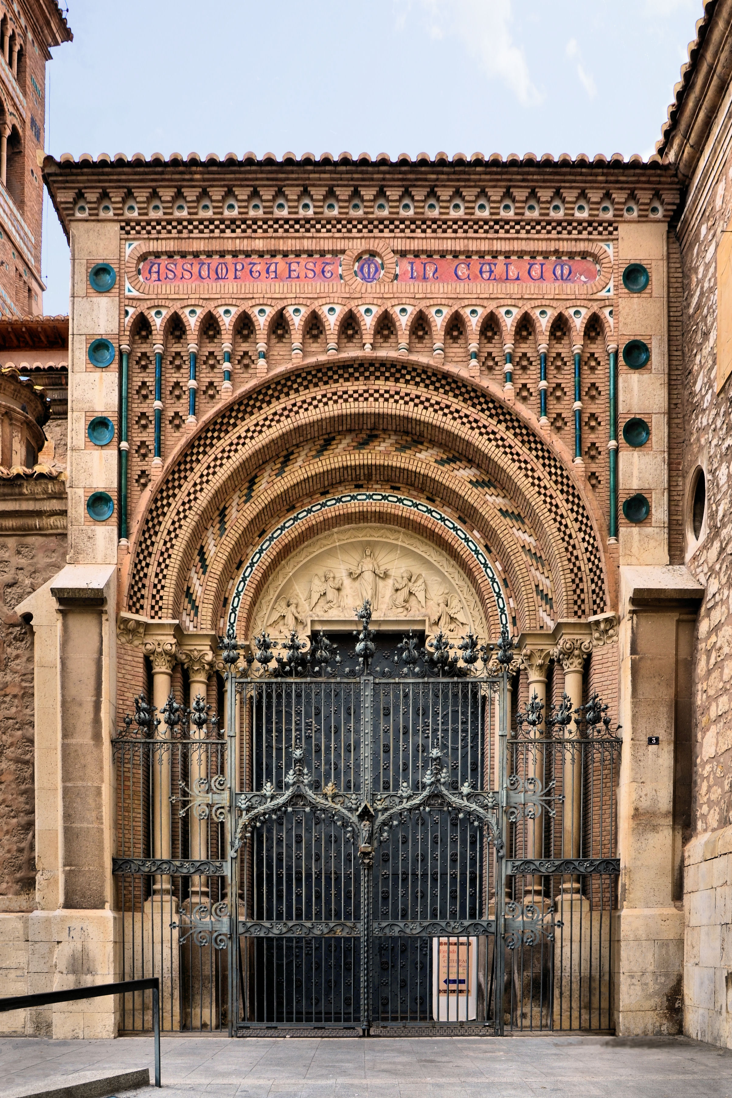 Puerta principal de la Catedral de Teruel